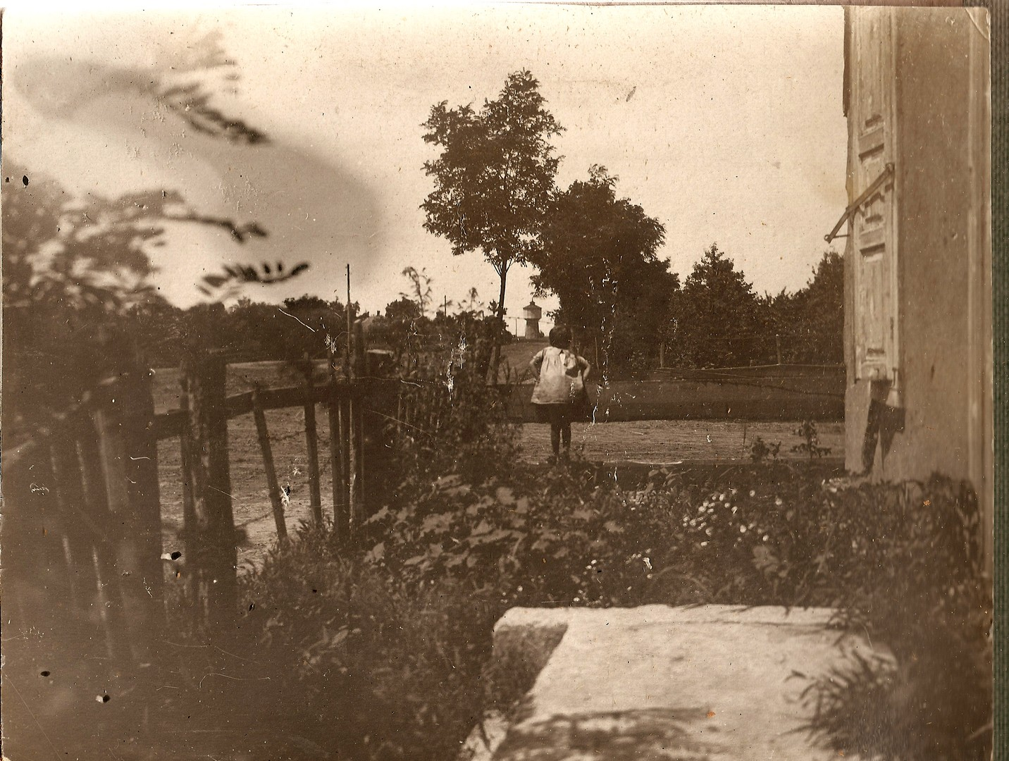 станица Ладожская, 1932 г. (из альбома альбома Н.Пемова). На заднем плане виднеется не сохранившееся ныне башня.